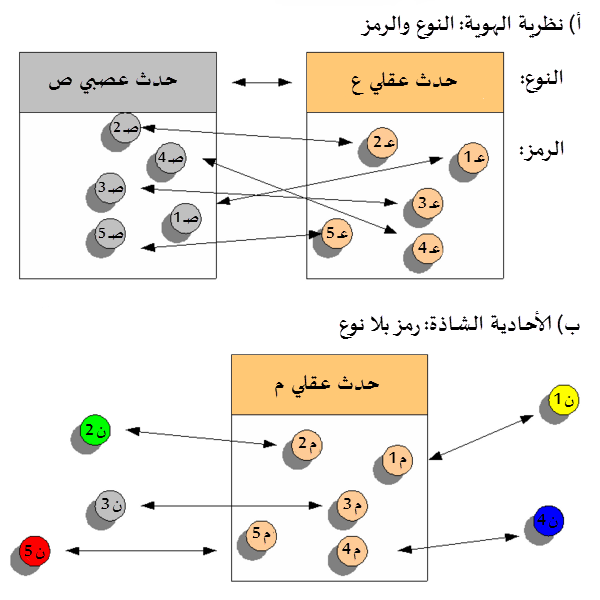 فلسفة العقل